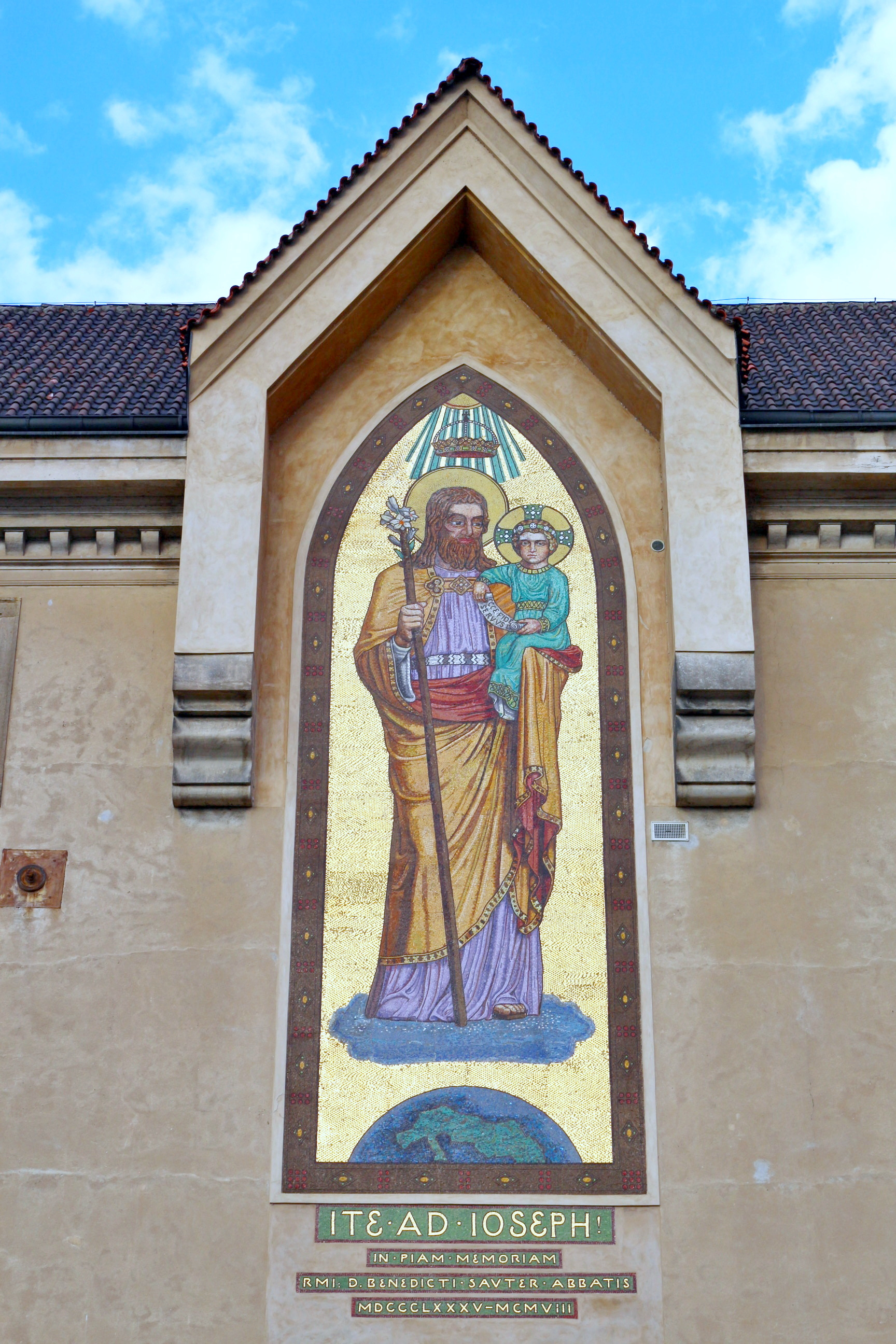 Klášter Na Slovanech - opatství